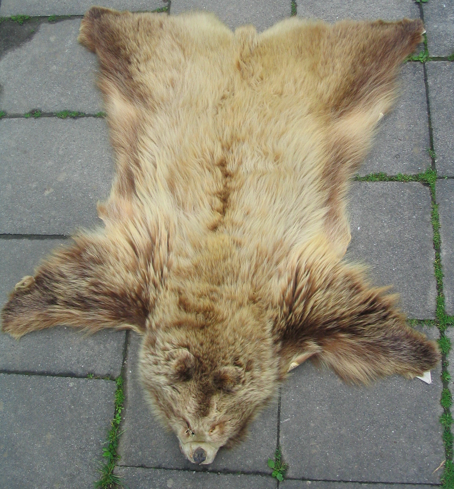 Grizzlyfell. Provenienz Alaska Range. Nach einer Woche Spurenverfolgung erlegt von Karl Friedrich Herhold.